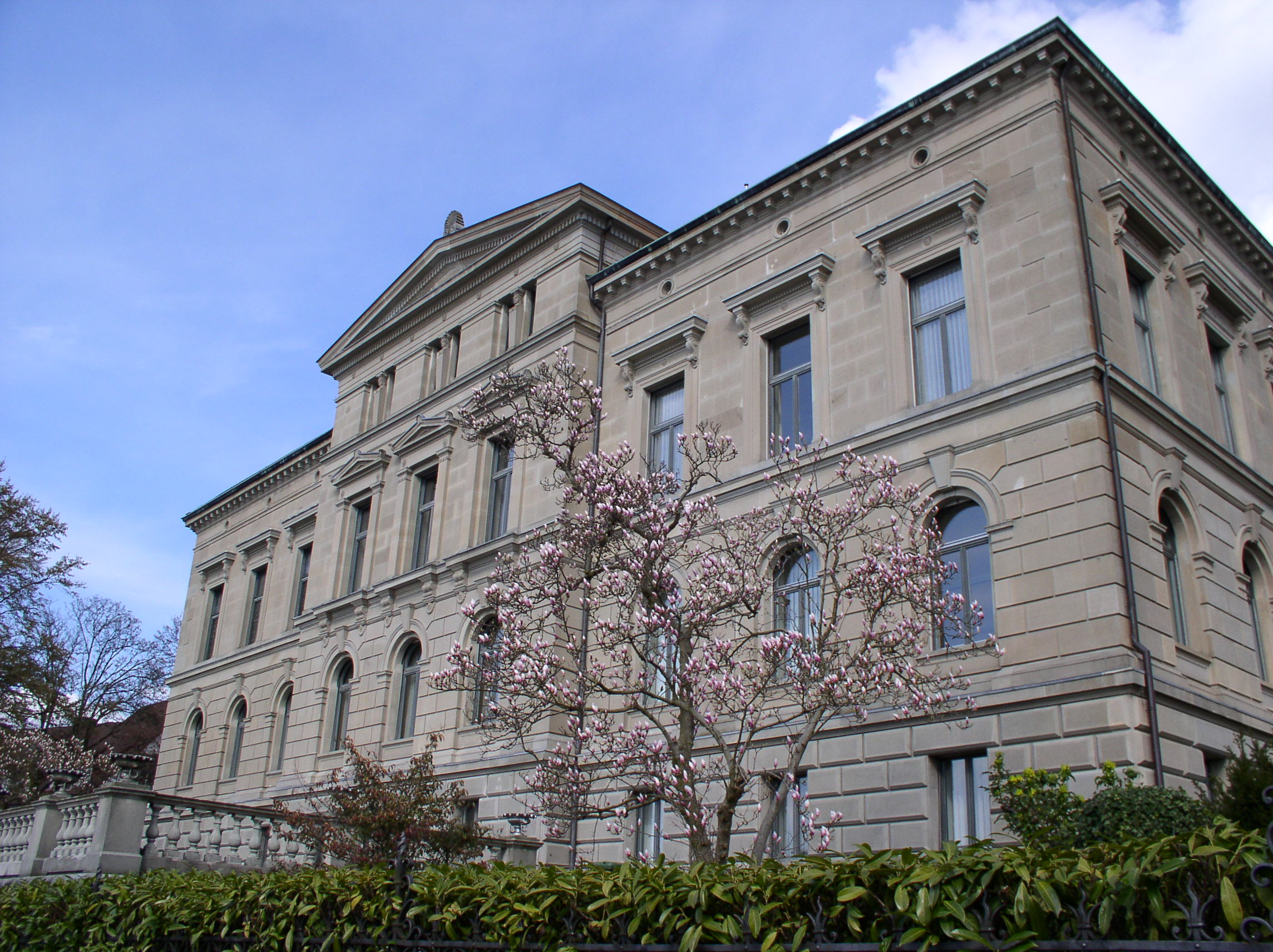 Description: Regierungsgebäude Zug von der Uferpromenade aus fotografiert. Erbaut 1868 - 1871 nach den Plänen des Zürcher Staatsbauinspektors Johann Caspar Wolff. Sitz des Kantons- und Regierungsrats. Source: photo taken by me, April 2004 Photographer: Baikonur